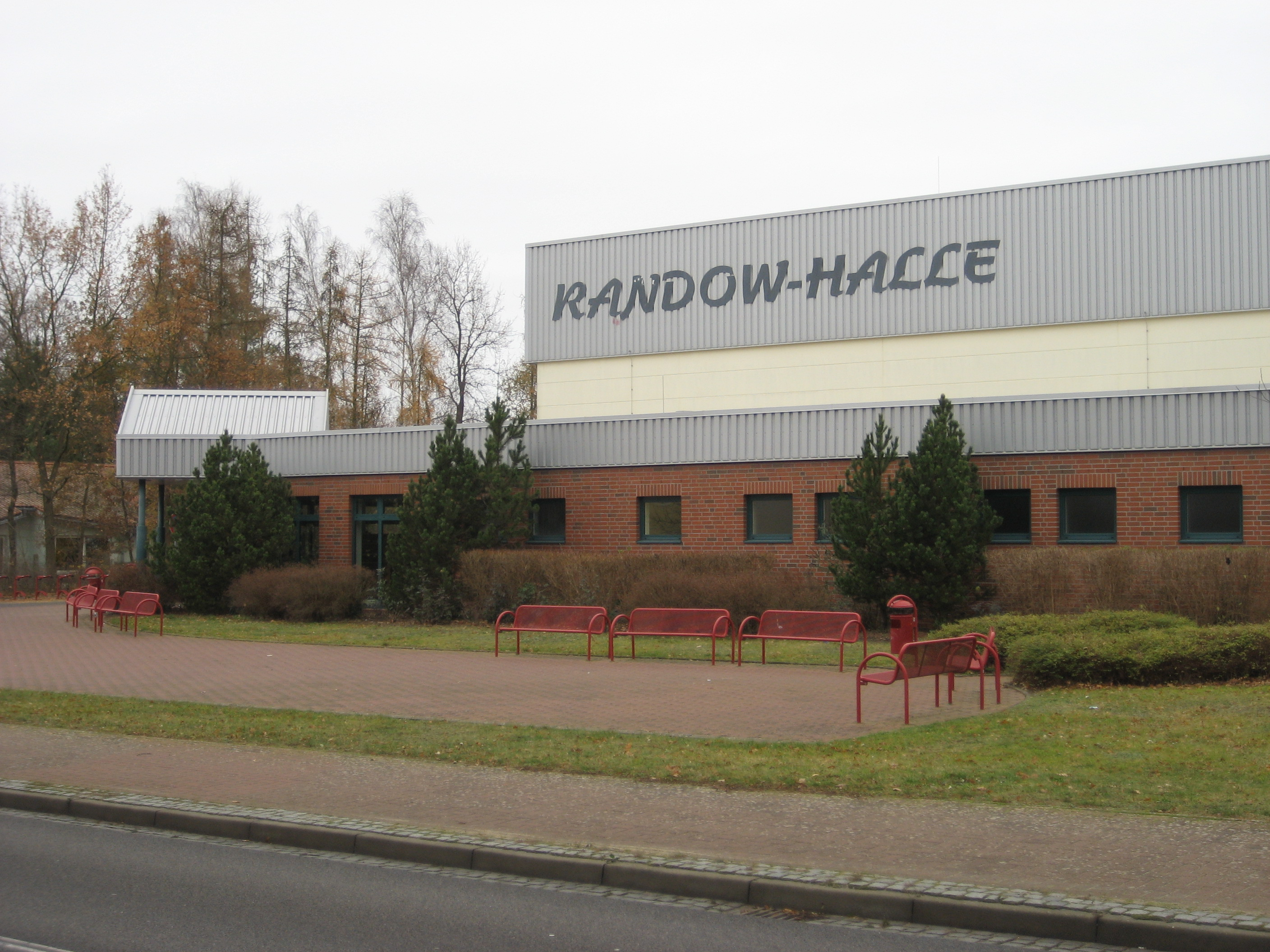 Die im September 2000 neu errichteten 3-Felder-Mehrzweckhalle „Randow-Halle“ am Ortsausgang Richtung Retzin (L 283).